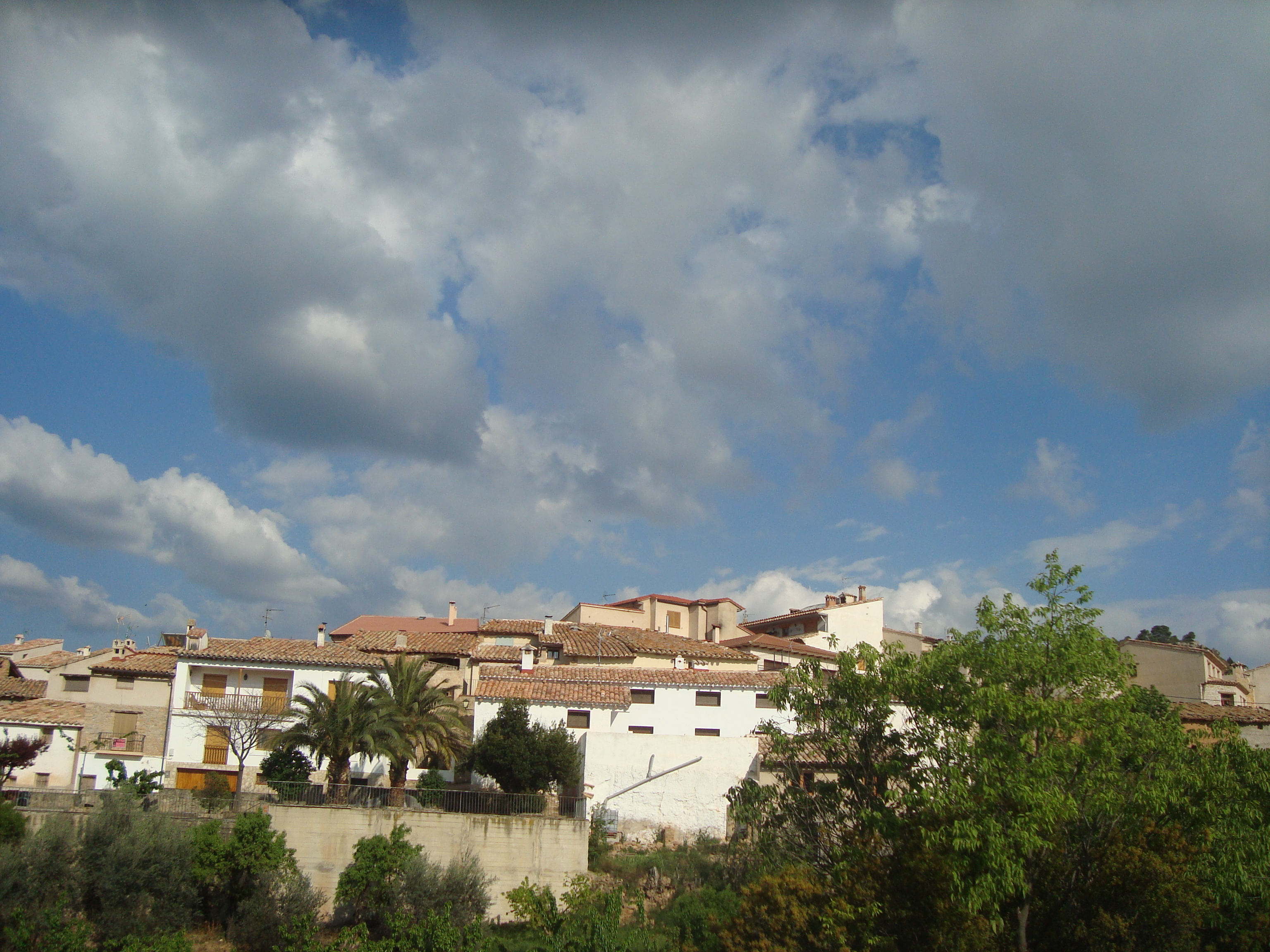 Panorámica (Las Planas de Castellote)